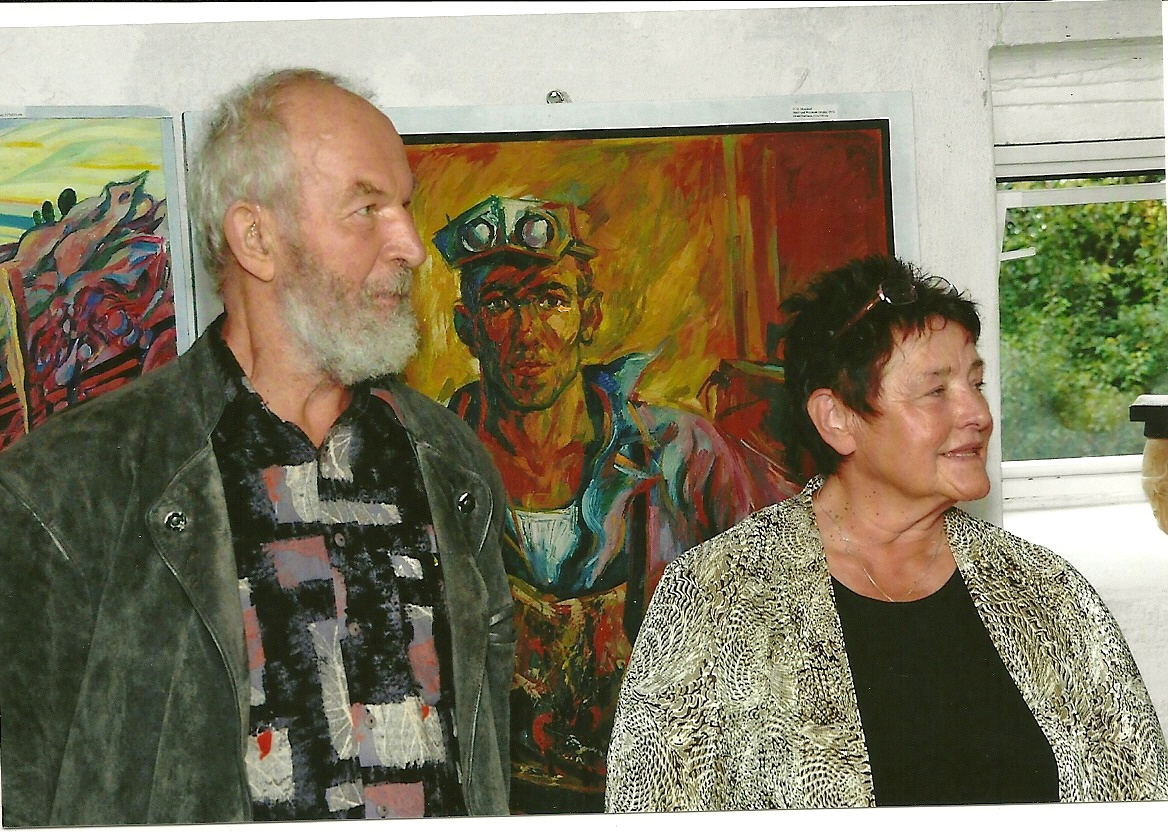 H.-D. Moosdorf mit seiner Frau Ingrid Mossdorf bei der Ausstellungseröffnung "Der Meister und sein Schüler". Die Ausstellung umfasst Werke dreier zeitgenössischer, deutscher Künstler - H.-D. Moosdorf, seines Schülers Eich von Lindberg und Rainer Wriecz, die am 13. August 2011 in der Art-of-Lindberg-Galerie, 09517 Zöblitz, Grundau Nr. 2, 037363/18551, , eröffnet wurde. Über die Ausstellungseröffnung wurde ausführlich im Kulturteil der Freien Presse vom 15.08.2011 berichtet.